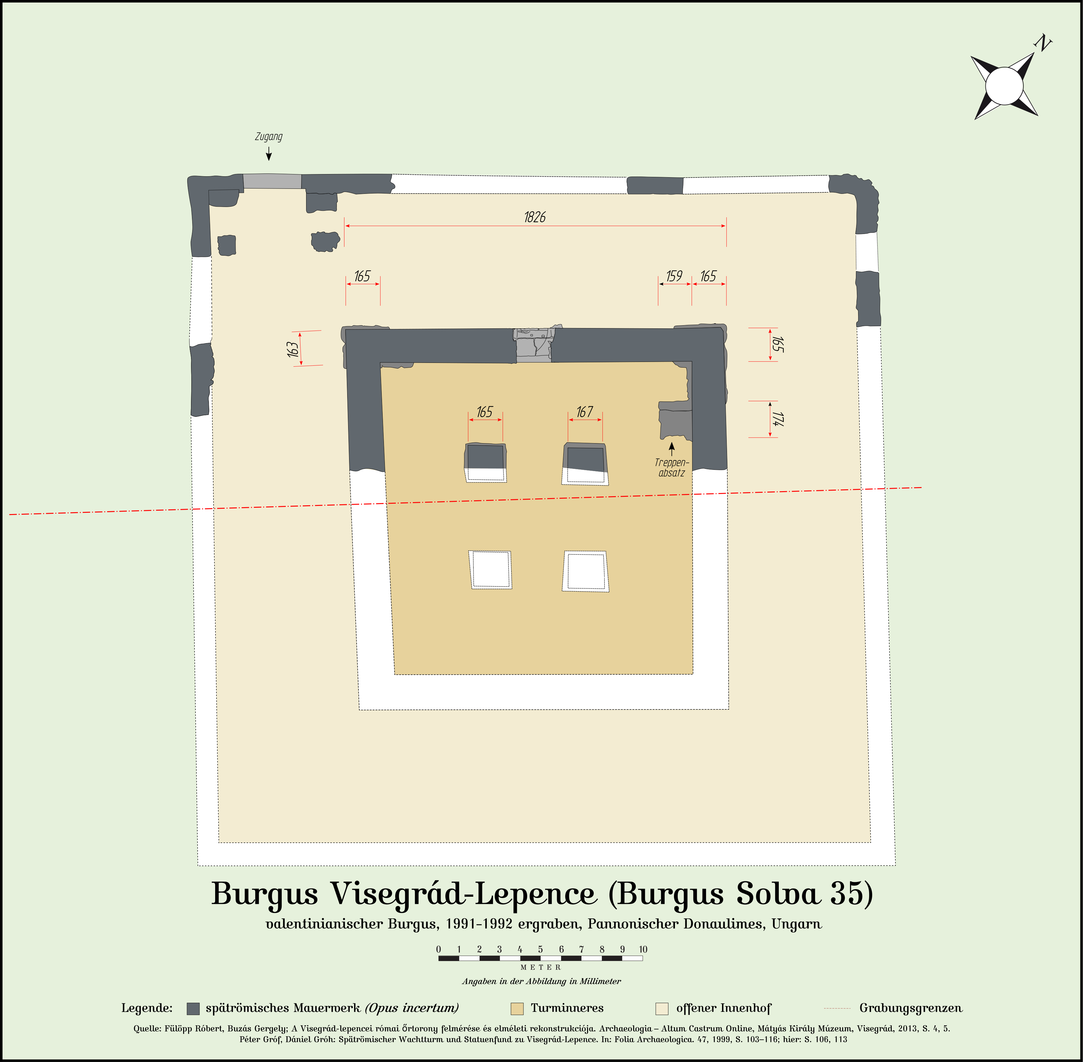 Der 1991 bis 1994 ergrabene 18,35×18,35 m große valentinianische Burgus Visegrád-Lepence am nordpannonischen Donauknie in Ungarn. Die hier gefundene Bauinschrift datiert in das Jahr 371 n. Chr.